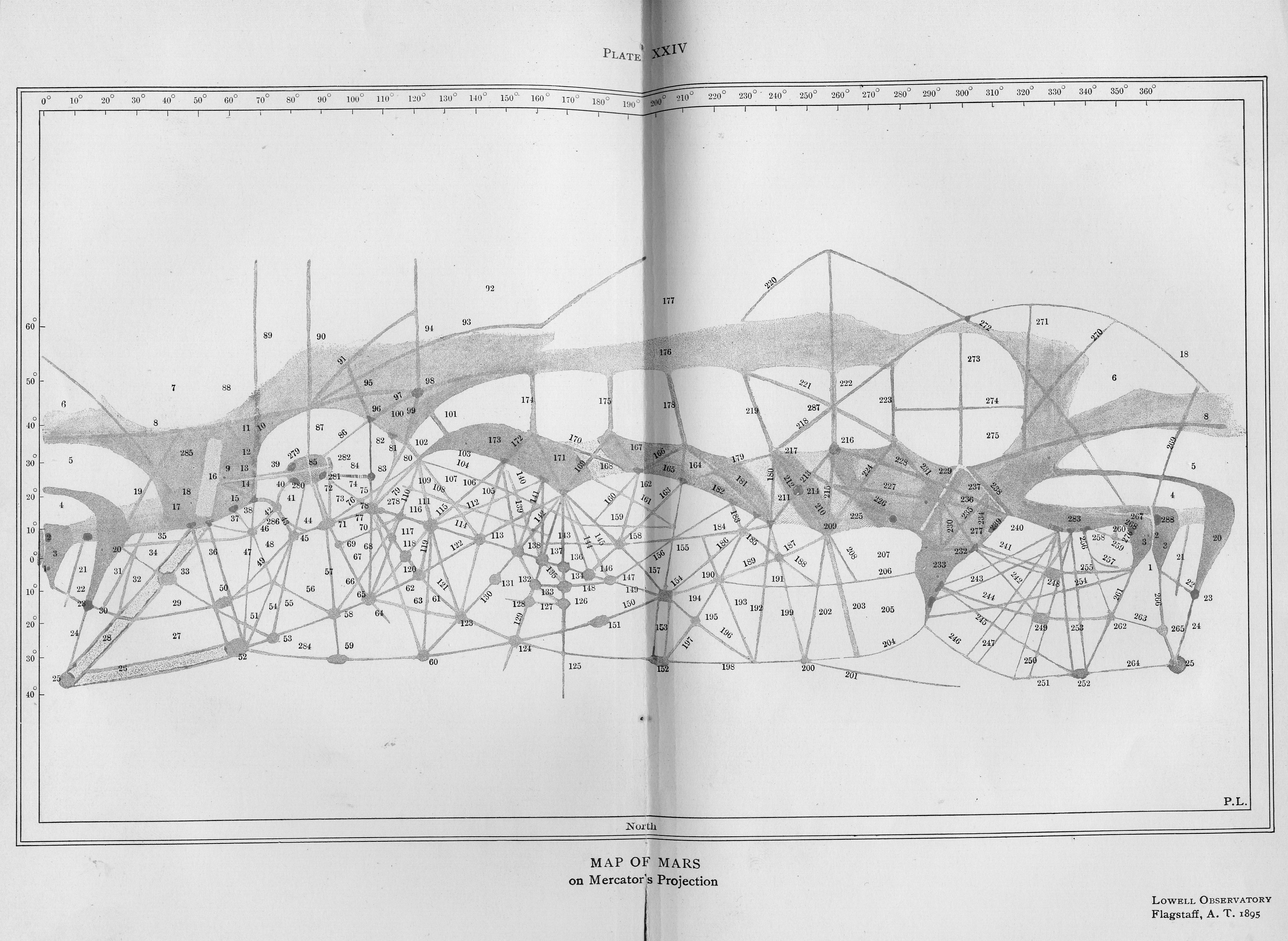 Description : Carte de Mars par Percival Lowell. Licence